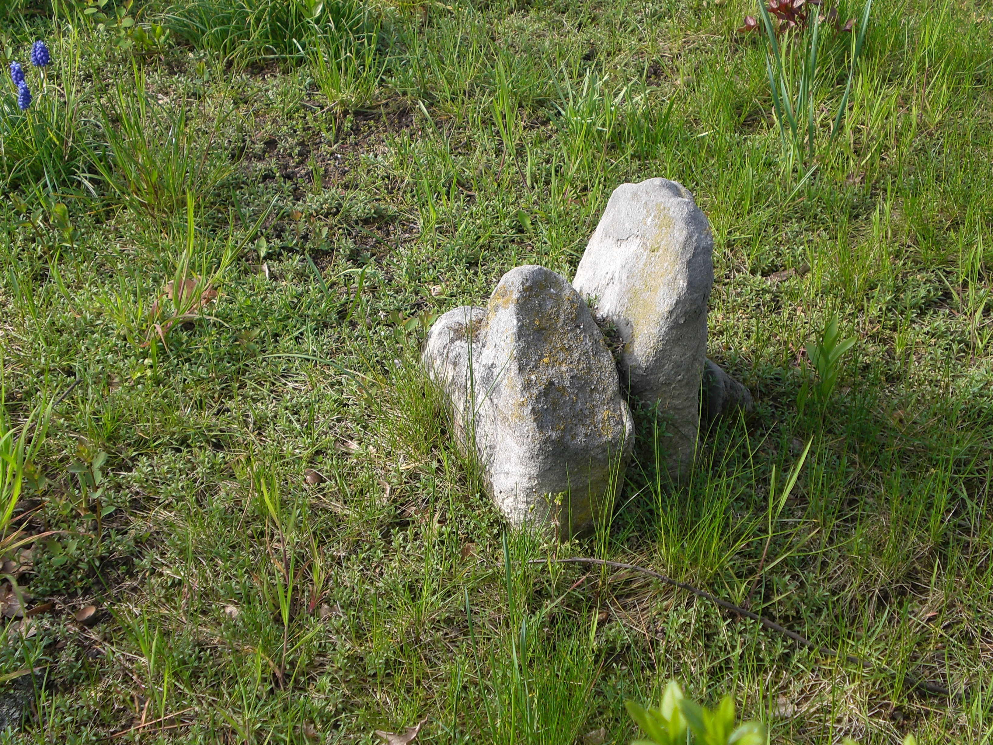 Sechs Steine Ilberstedt, fünfter Stein